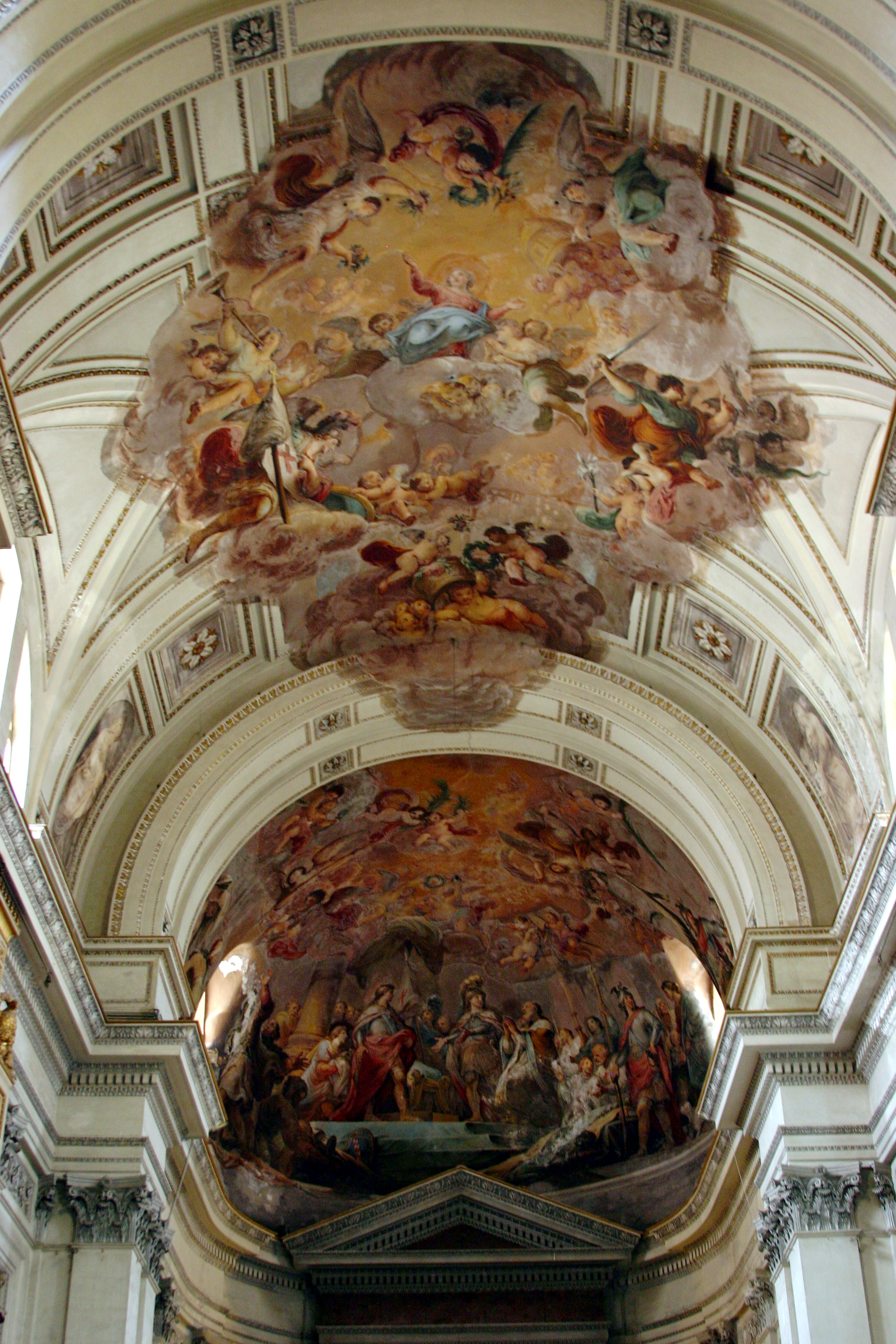 Cathedral of Palermo